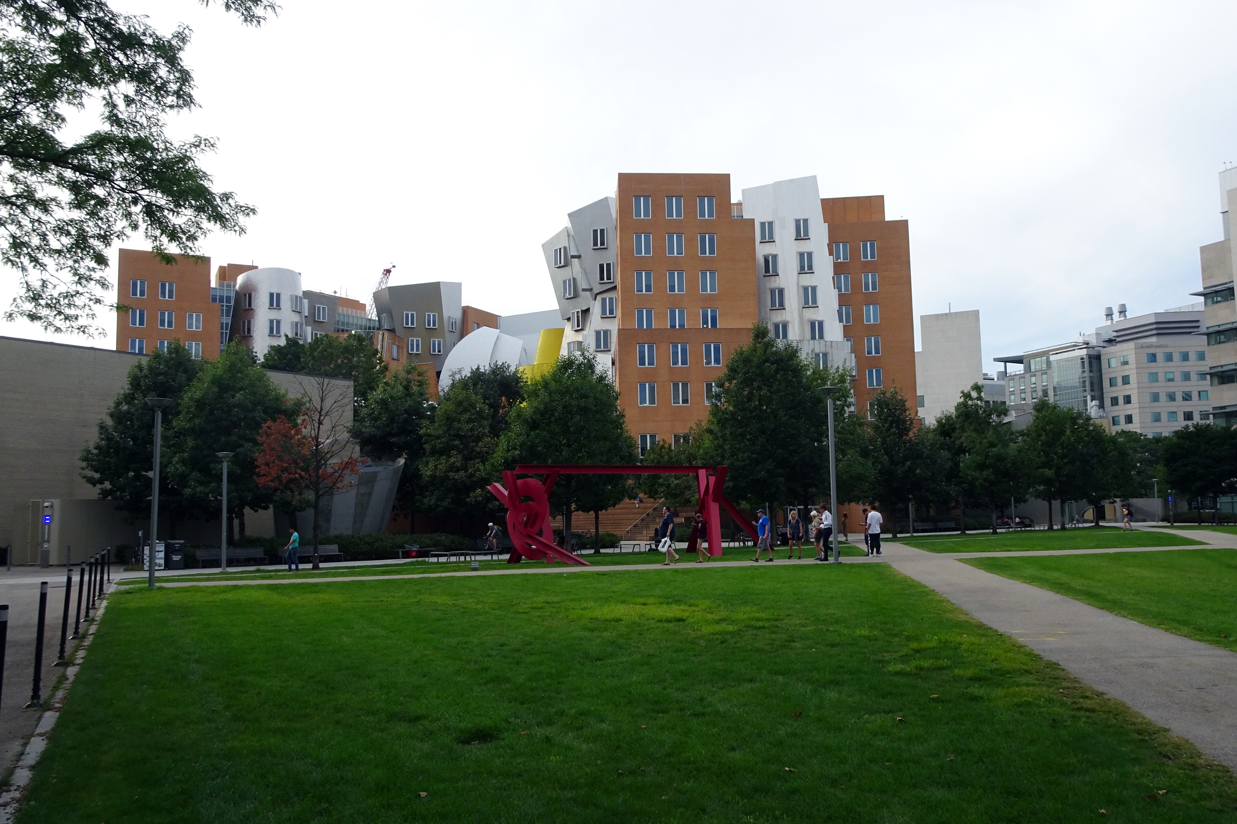 North Court du MIT avec la sculpture Aesop's Fables, II devant les bâtiments du MIT Radiation Laboratory et du MIT Computer Science and Artificial Intelligence Laboratory